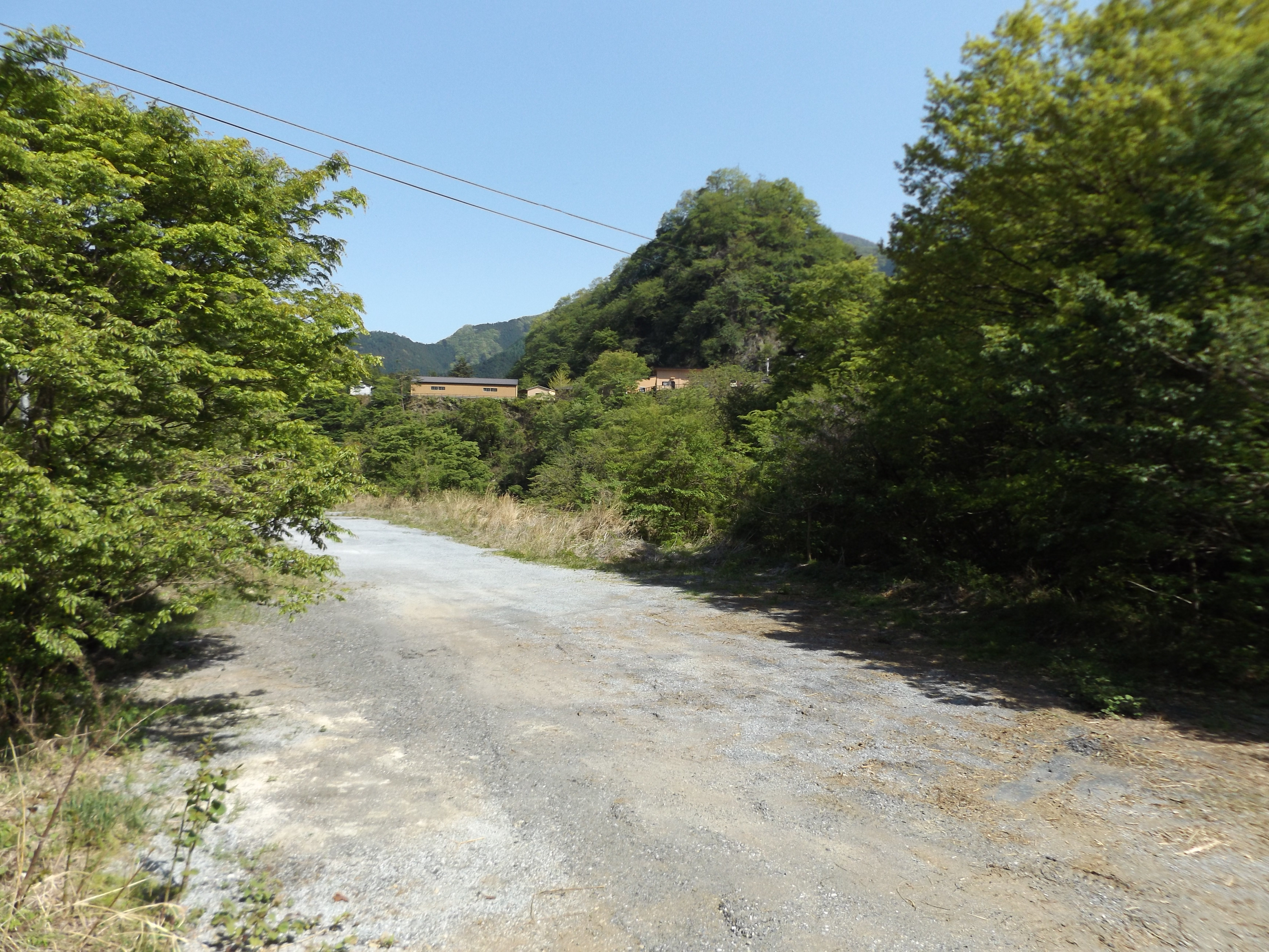 東京都西多摩郡奥多摩町にある、東京都水道局小河内線（東京都専用線小河内線）水根駅跡。西武鉄道を経て奥多摩工業水根貨物線の所属となり、名目上は未だ「休止中の駅」扱い。